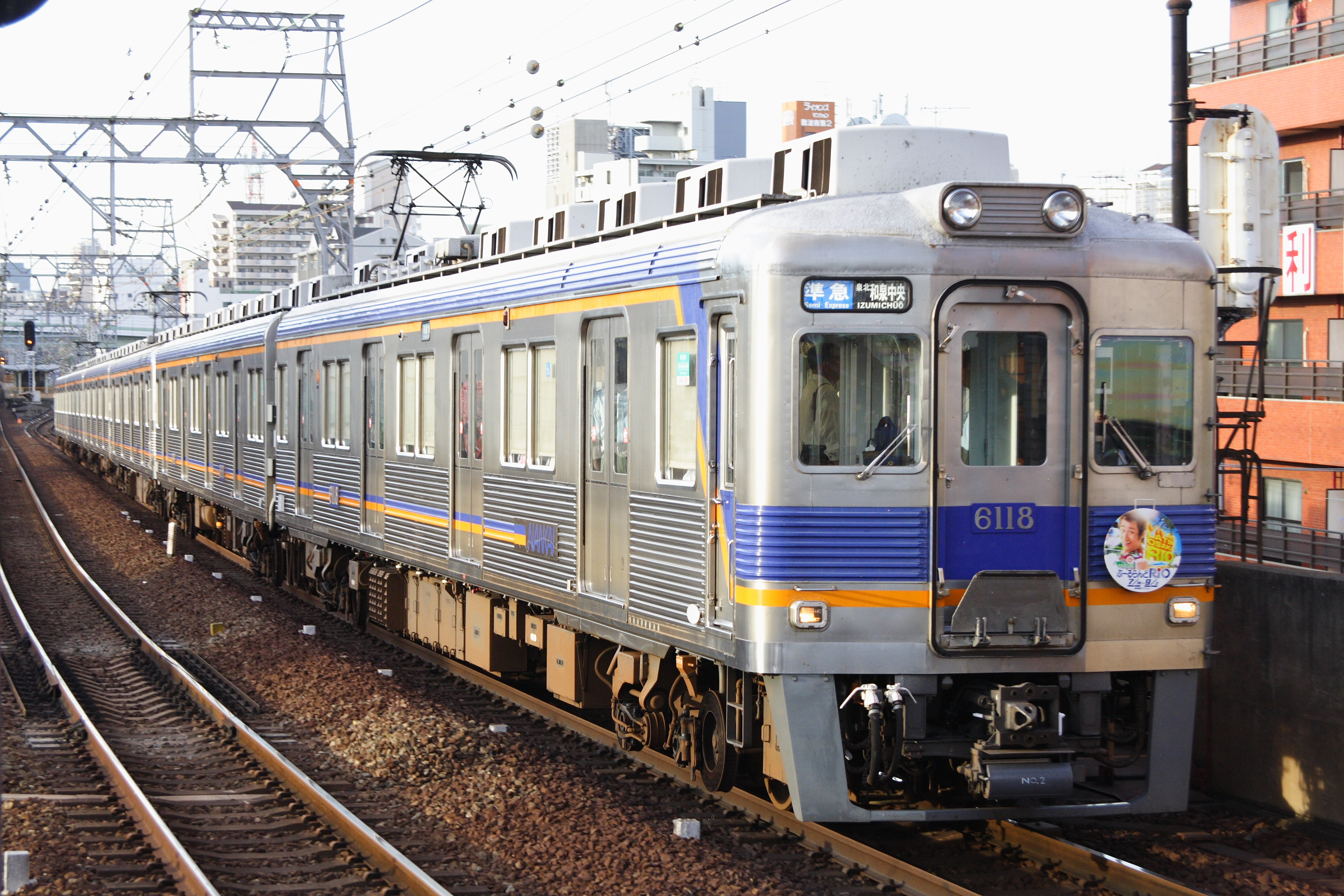 南海6100系電車